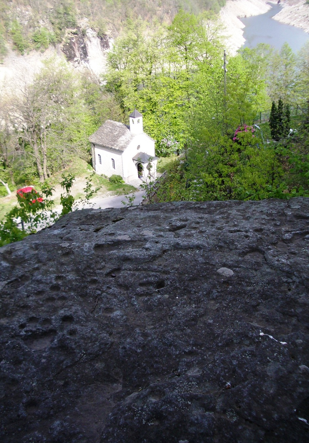 Berzona, Valle Verzasca, Switzerland self-made, May 2006